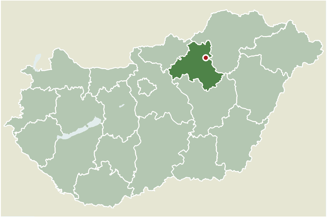 Eger